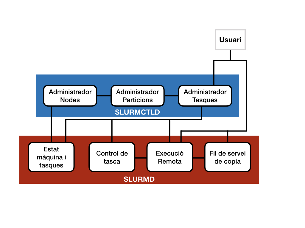 comunicació entre slurmd, slurmctld i els diferents managers